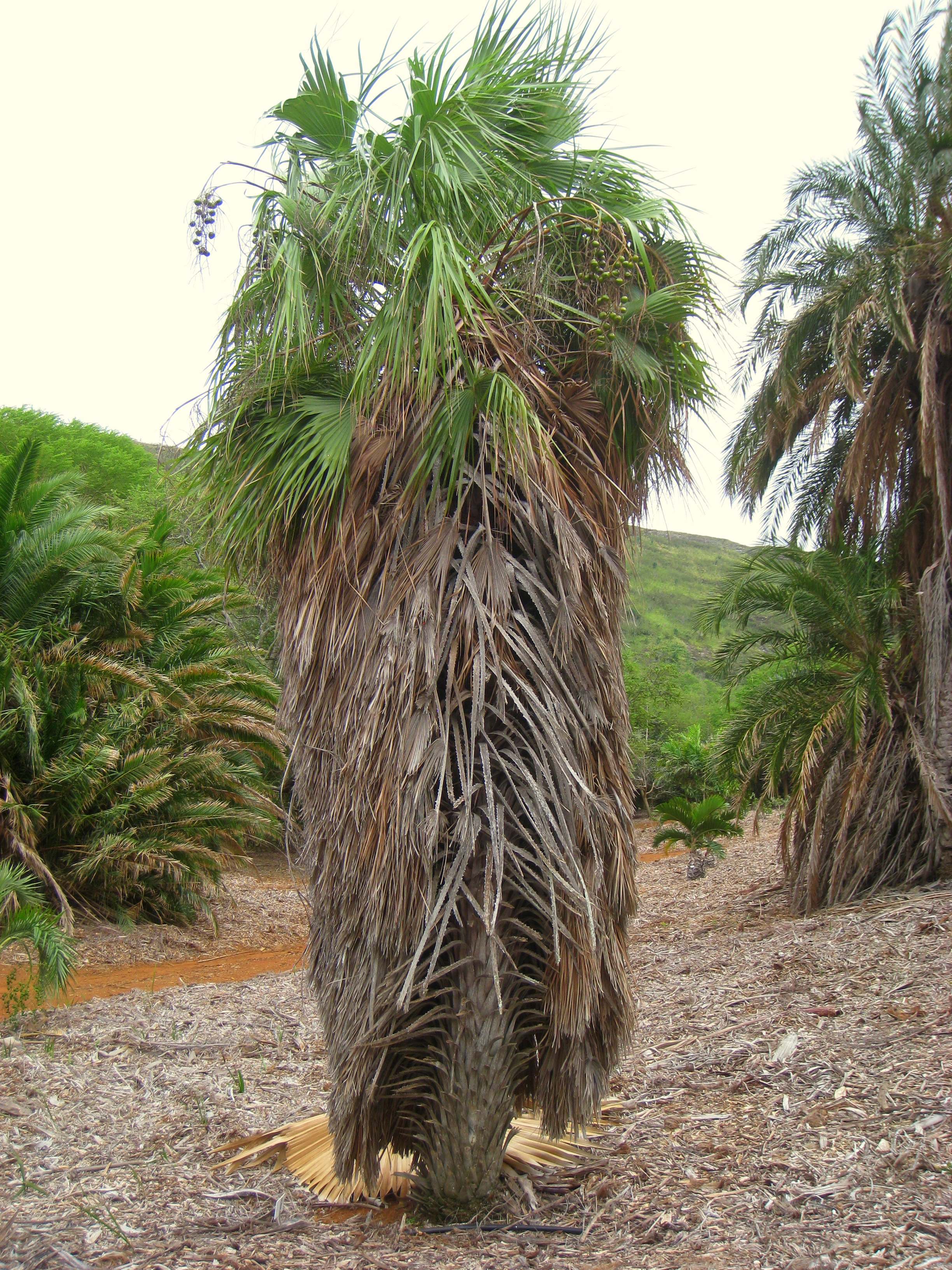 Brahea aculeata in Koko Crater Botanical Garden, Honolulu, Hawaii, USA.